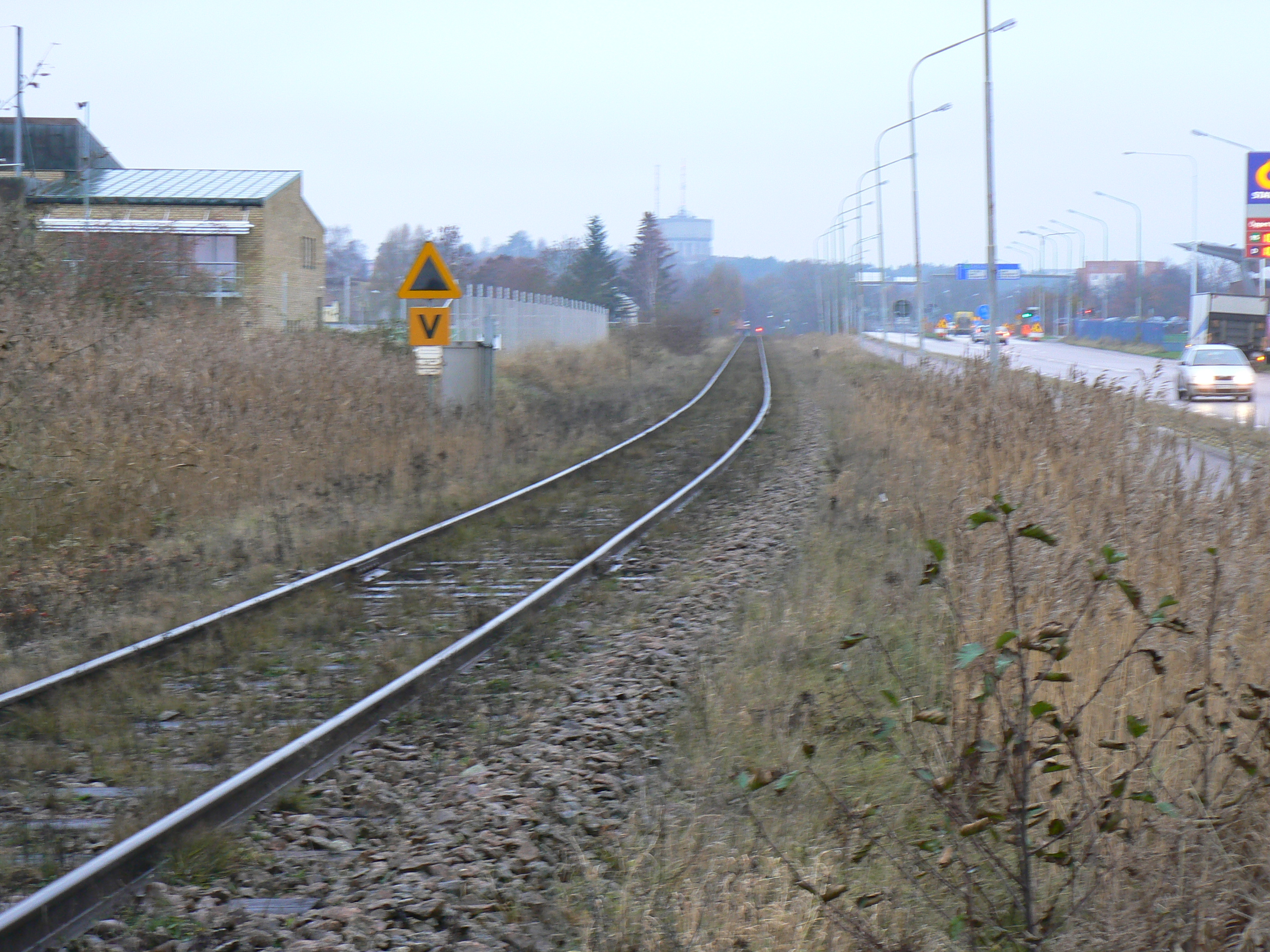 Stångådalsbanan. Railway between Linköping and Kalmar in Sweden. Photo by Skvattram 2006-11-16.